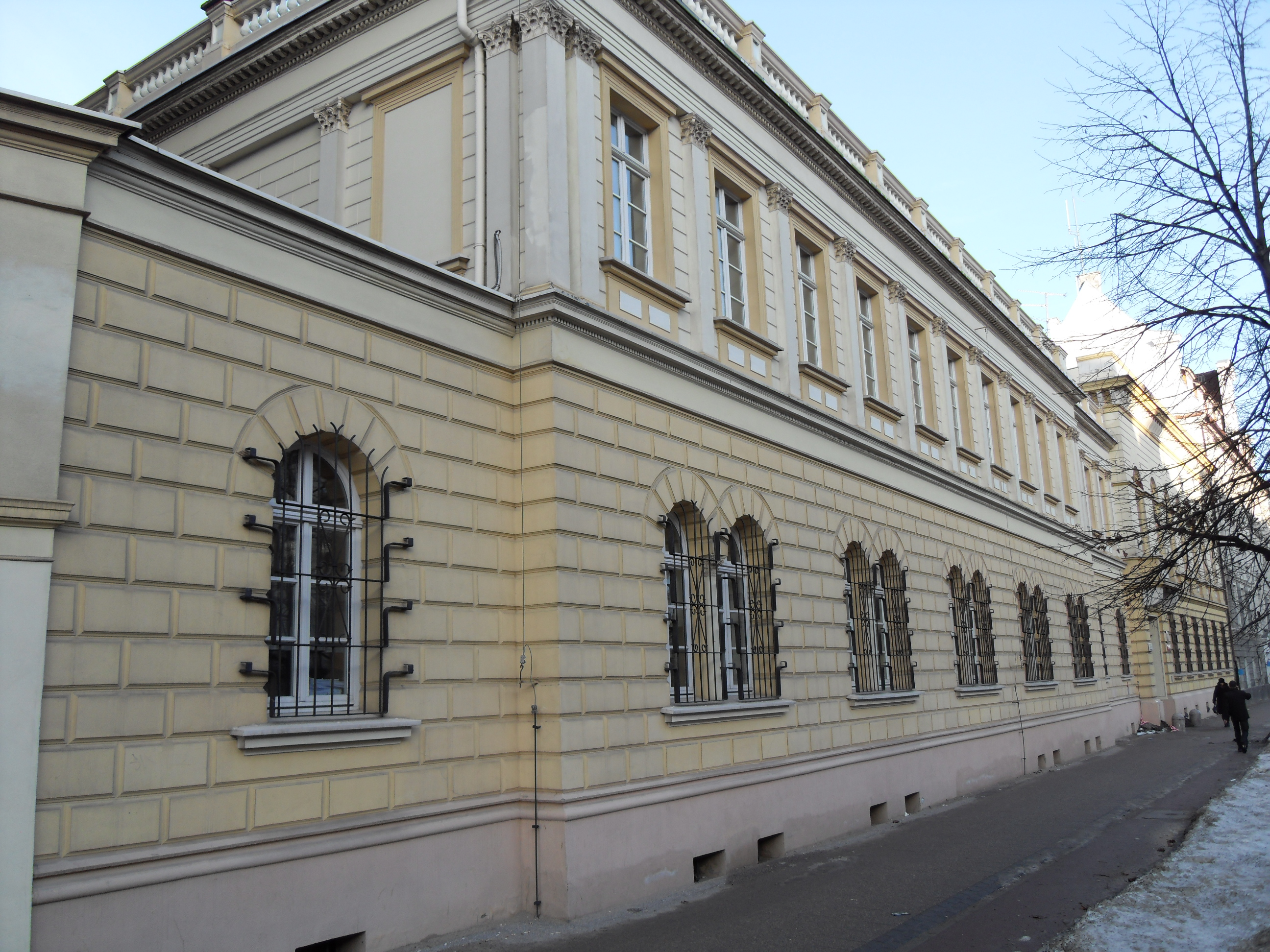 Sąd Apelacyjny w Gdańsku, ul. Nowe Ogrody 28/29. Część zabudowań byłego Sądu Kryminalnego w Gdańsku, w okresie panowania pruskiego.